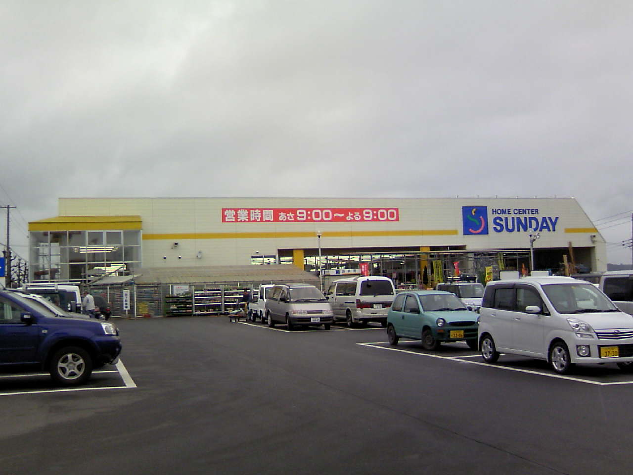 ホームセンター・サンデー 八戸根城店 (Homecenter Sunday Nejoten- HACHINOHE, AOMORI, JAPAN)